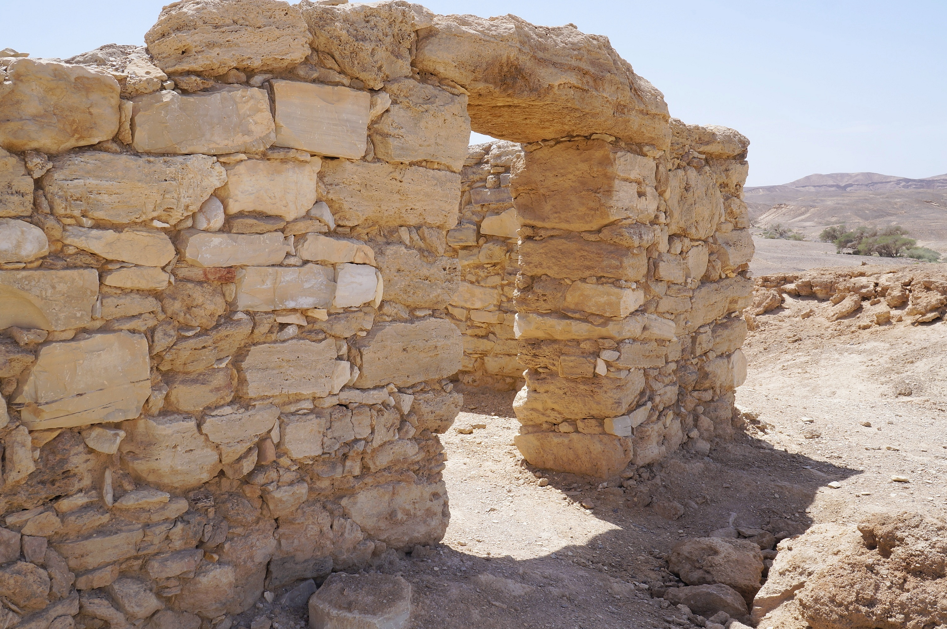 עיר נבטית באזור הערבה צפונית לפארן ודרומית למרכז ספיר. היא פעלה כתחנת מעבר בדרך הבשמים בממלכת הנבטים בתקופה הרומית. ביישוב היה חאן וסביבו מרכז ציבורי. במקביל, התפתחה במקום חקלאות ענפה. בפי הבדואים ששכנו באזור נקרא היישוב בשם "מוית עוואד".